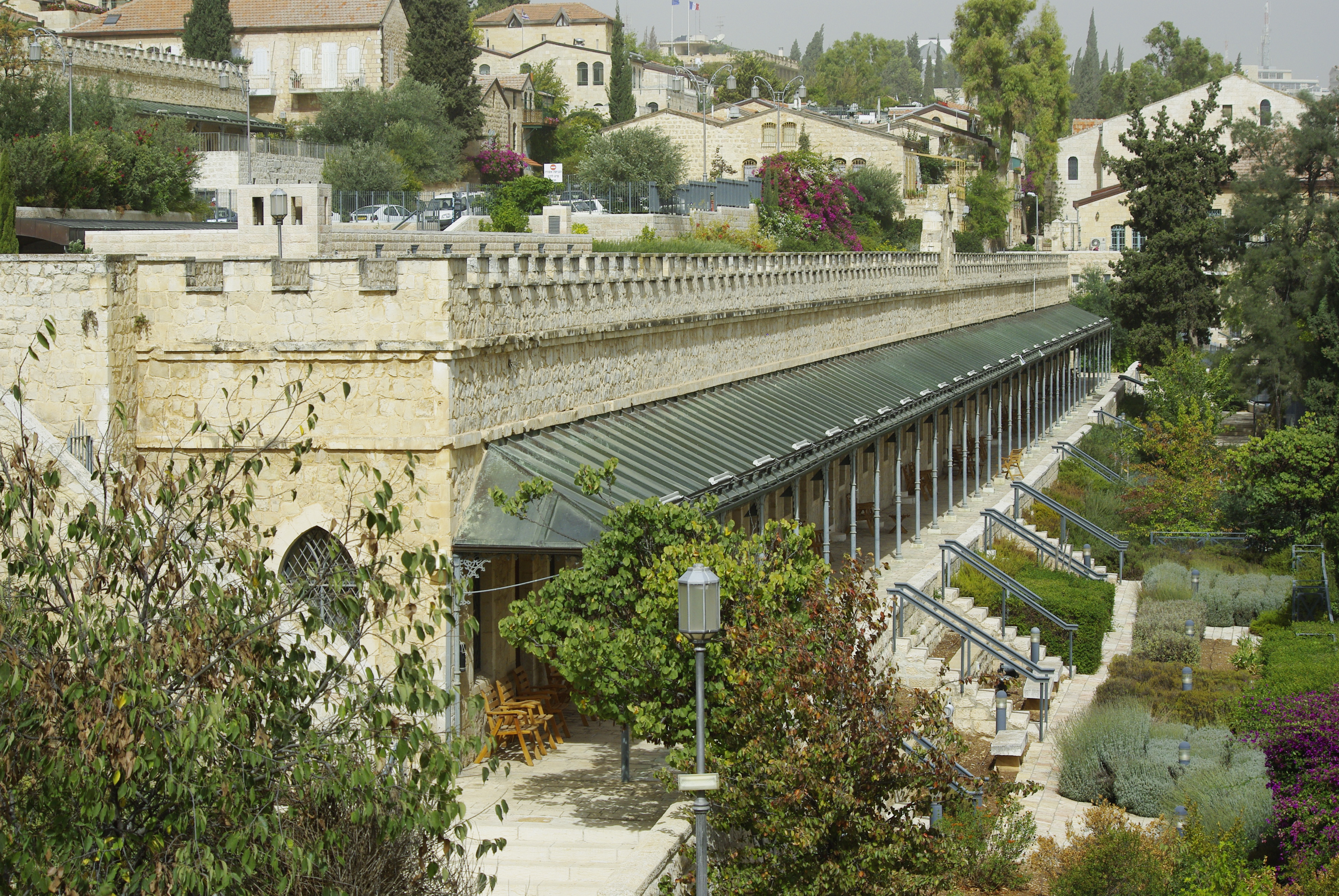 Mishkenot Sha'ananim, premiers bâtiments de Jérusalem hors les murs (1860)